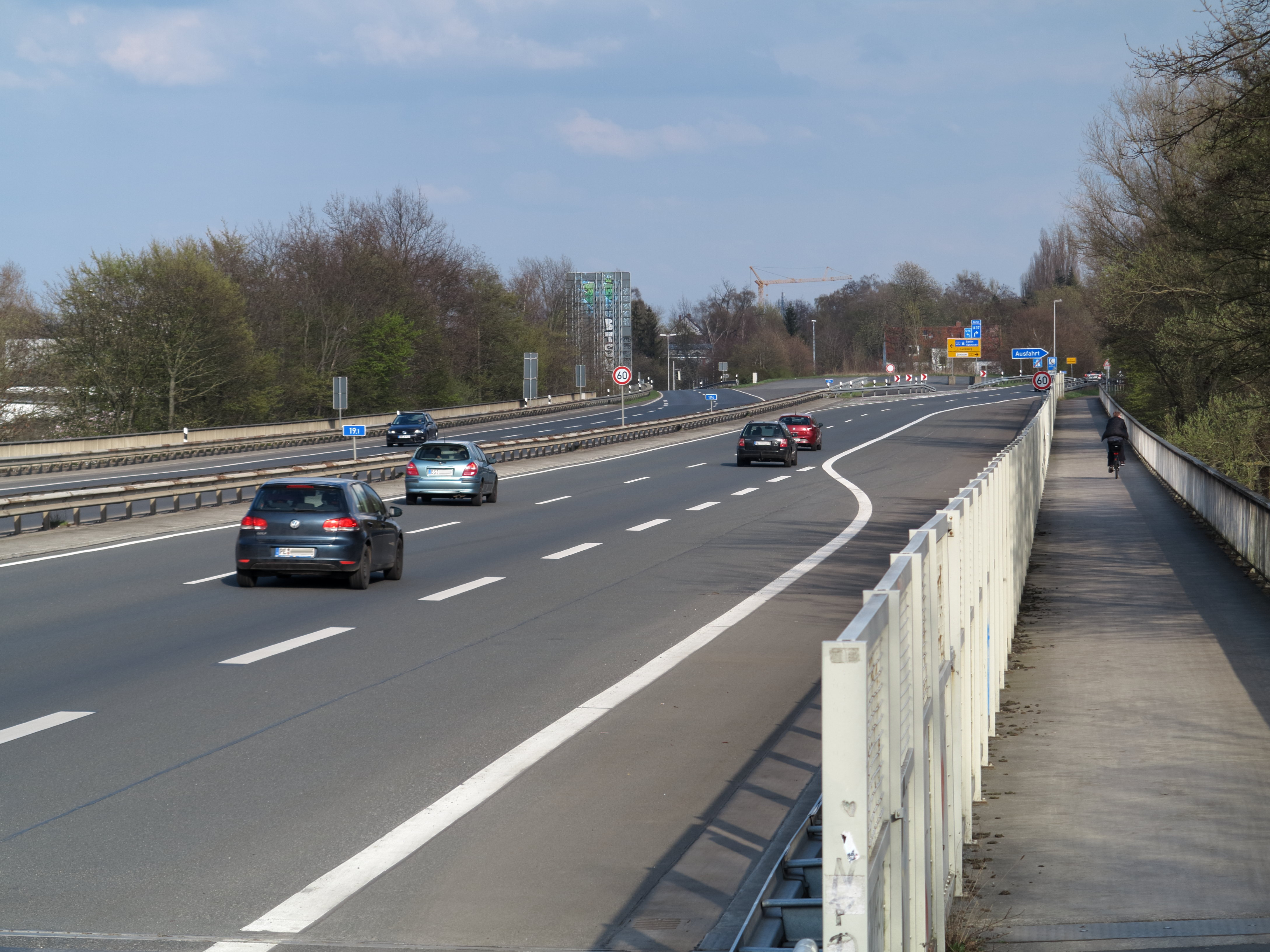 Braunschweig: die Autobahnbrücke der A392 über die Oker